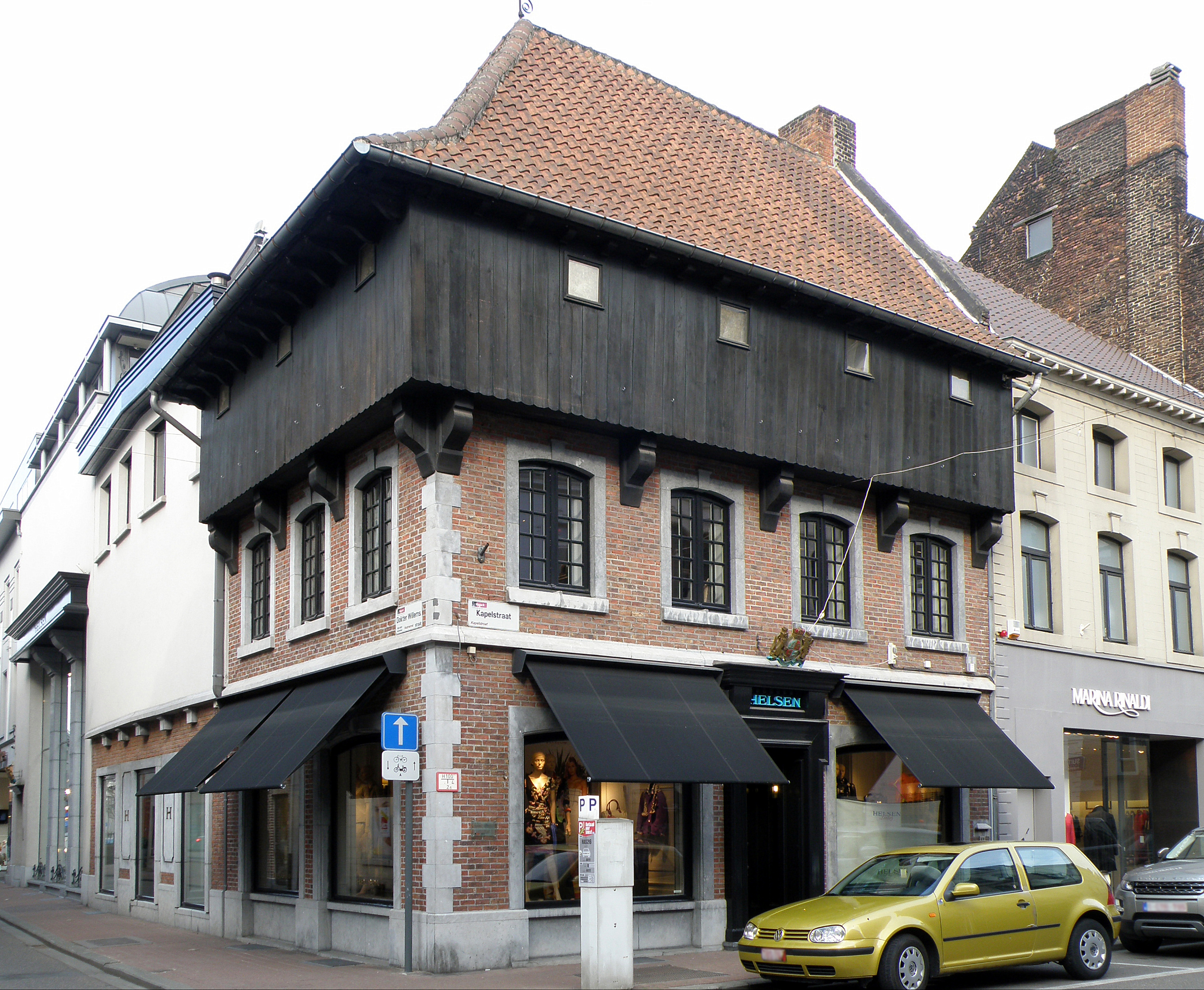 Hasselt (prov. Limburg, België). Huis "De Wijzer" (anno 1727, kern 16de eeuw), Kapelstraat nr. 57 (hoek Dr. Willemsstraat).